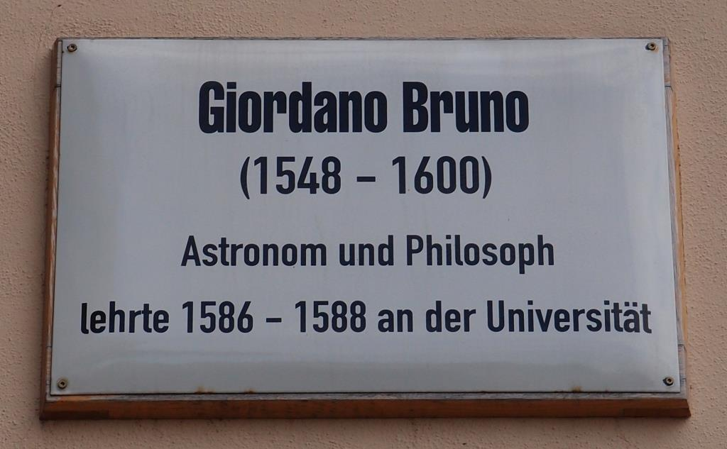 Tafel für den Priester, Dichter, Philosophen und Astronomen Giordano Bruno (1548-1600) in Wittenberg, Leucorea